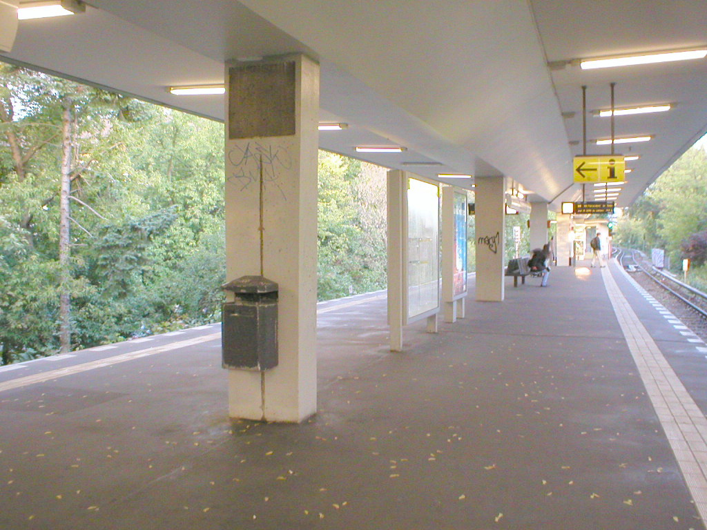 U-Bahn Berlin, Bahnhof Scharnweberstraße (U6)